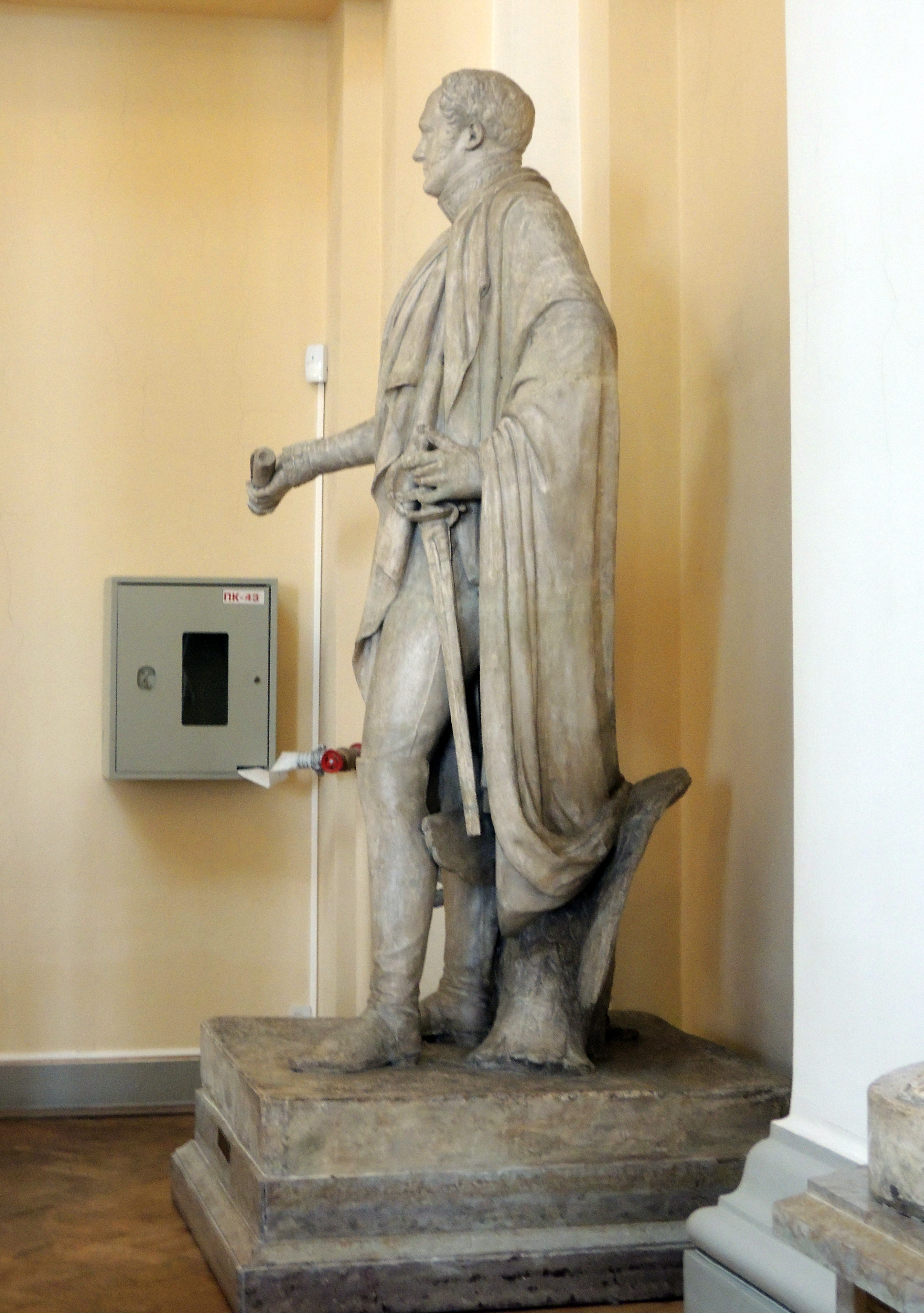 Скульптура в Верхнем вестибюле Русского музея. Мартос И. П. Модель памятника Александру Первому в Таганроге. 1828-1830. Гипс.